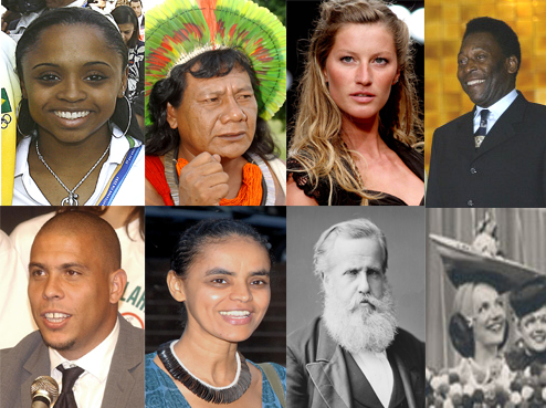 Imagens de oito brasileiros, da esquerda para a direita: Linha 1: Daiane dos Santos, Akyboro Kayapó, Gisele Bündchen e Pelé. Linha 2: Ronaldo, Marina Silva, D. Pedro II e Carmen Miranda.